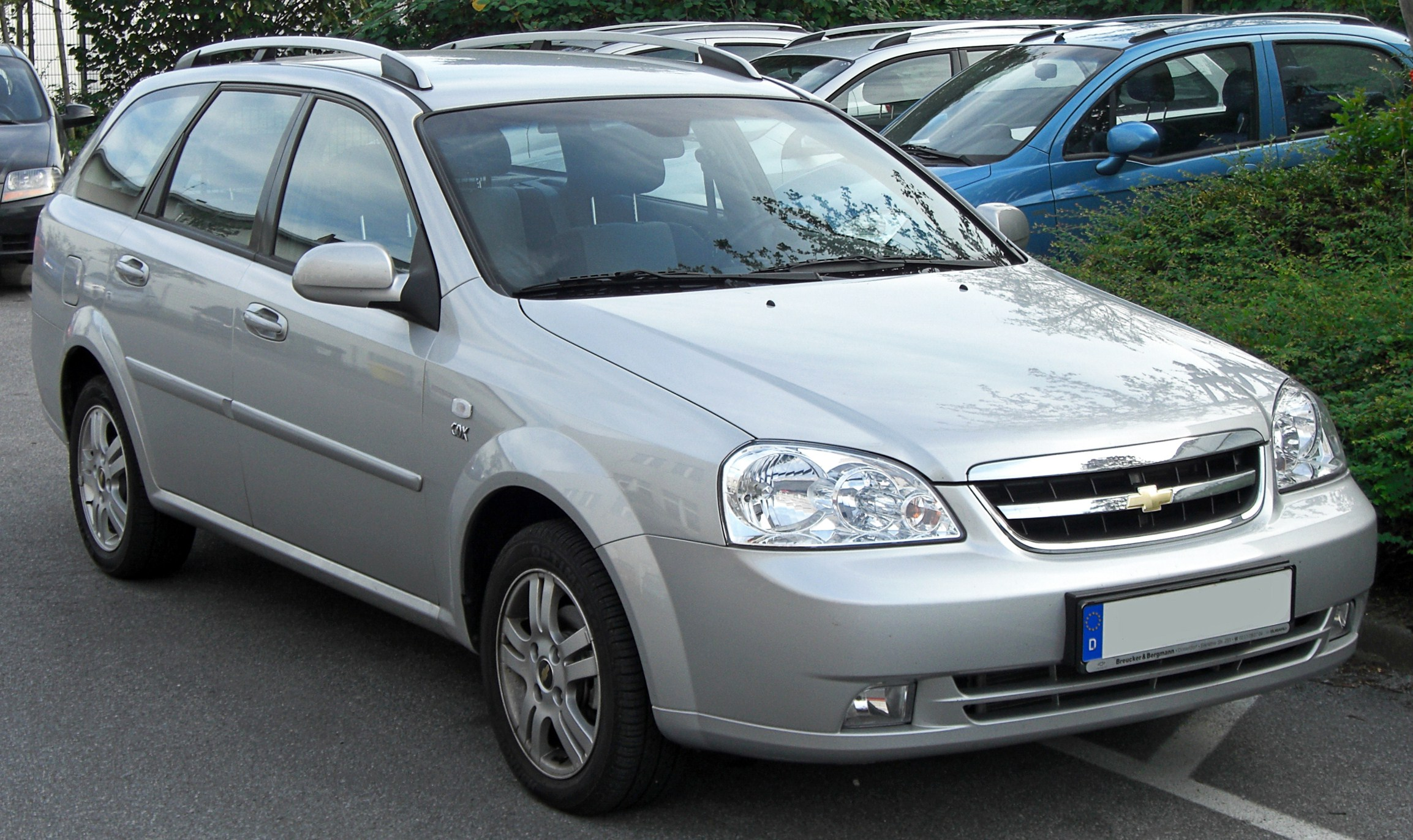 Chevrolet Nubira Kombi